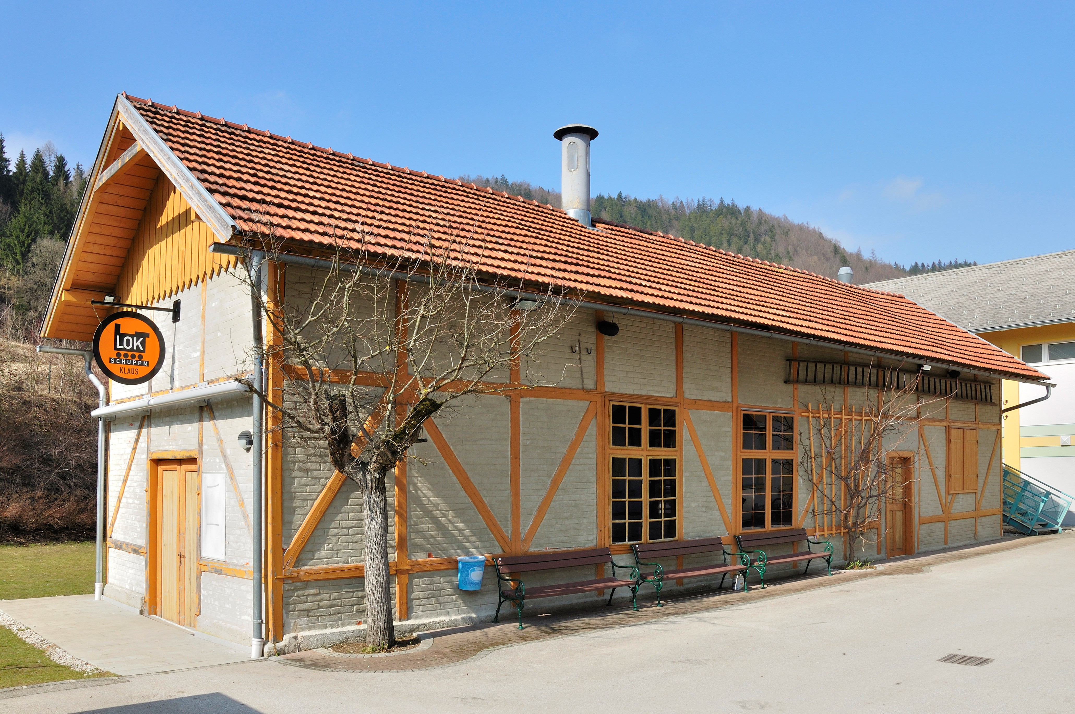 Ehem. Lokschuppen